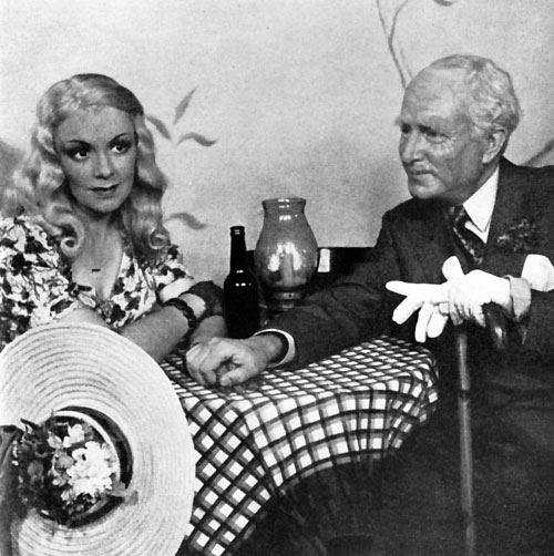 Isa Quiensel och Georg Funquist i Tre valser